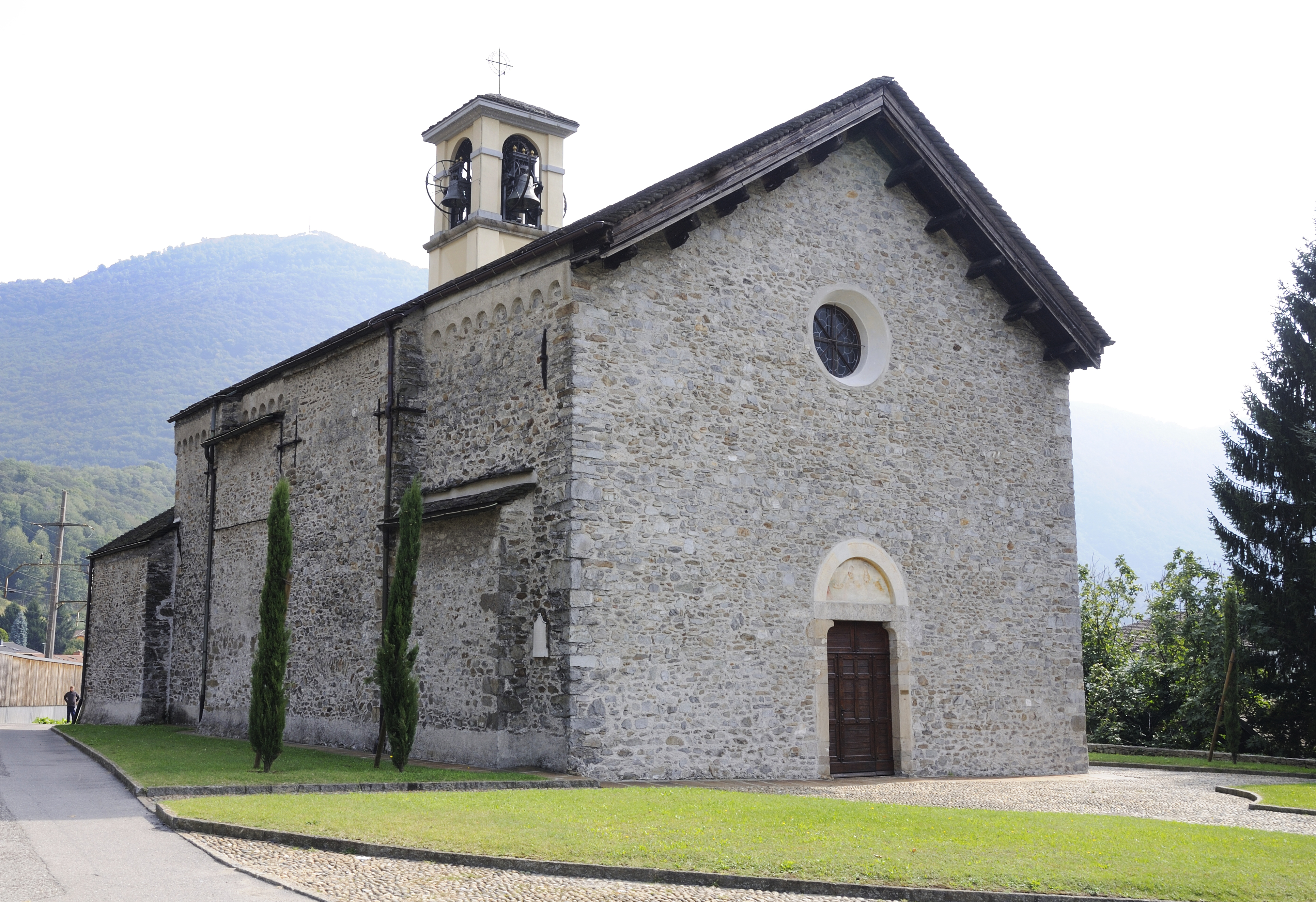 Chiesa Santi Giovanni evangelista e Martino - Bironico Monteceneri